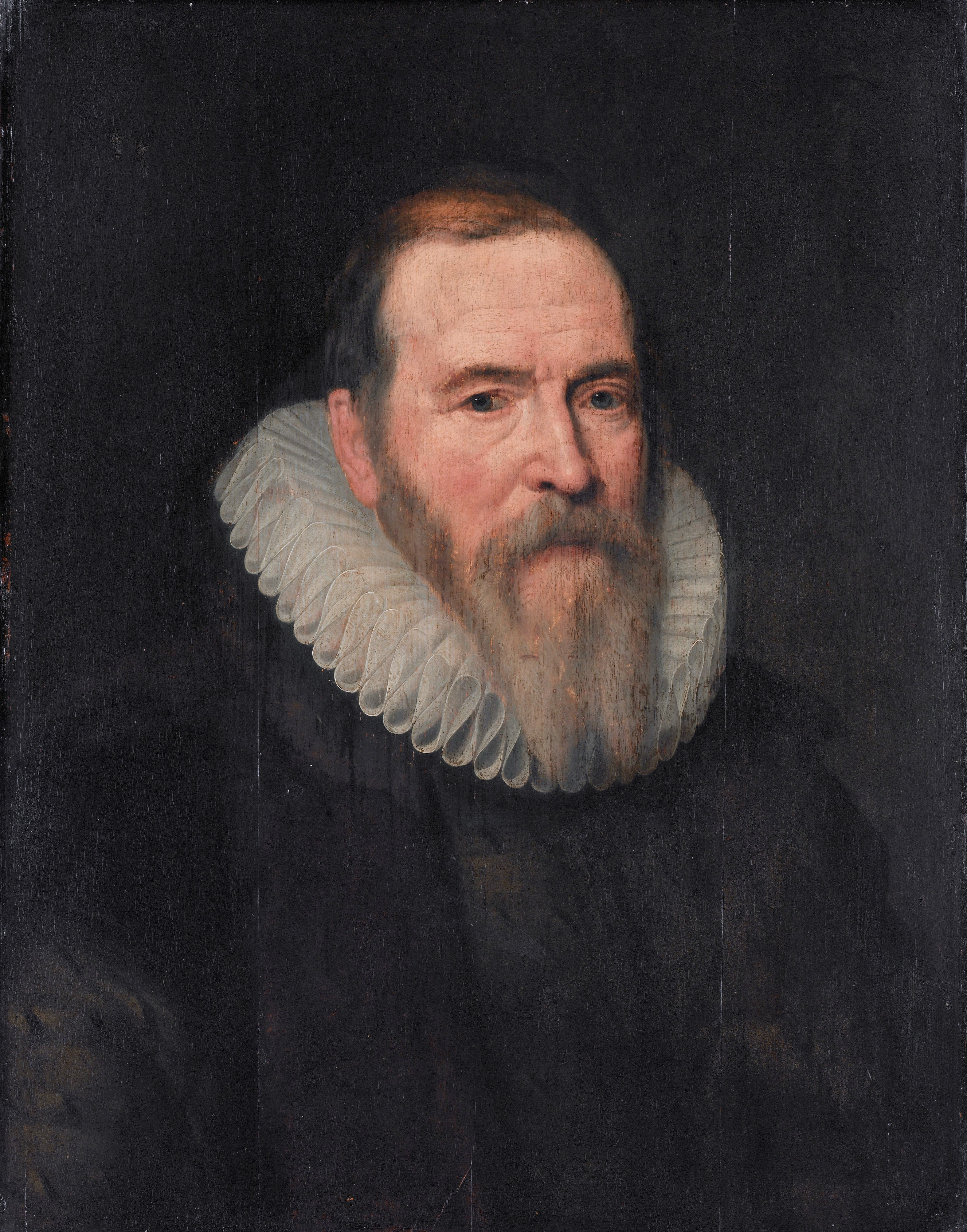 Portret van Johan van Oldenbarnevelt (1547-1619), pensionaris van Rotterdam